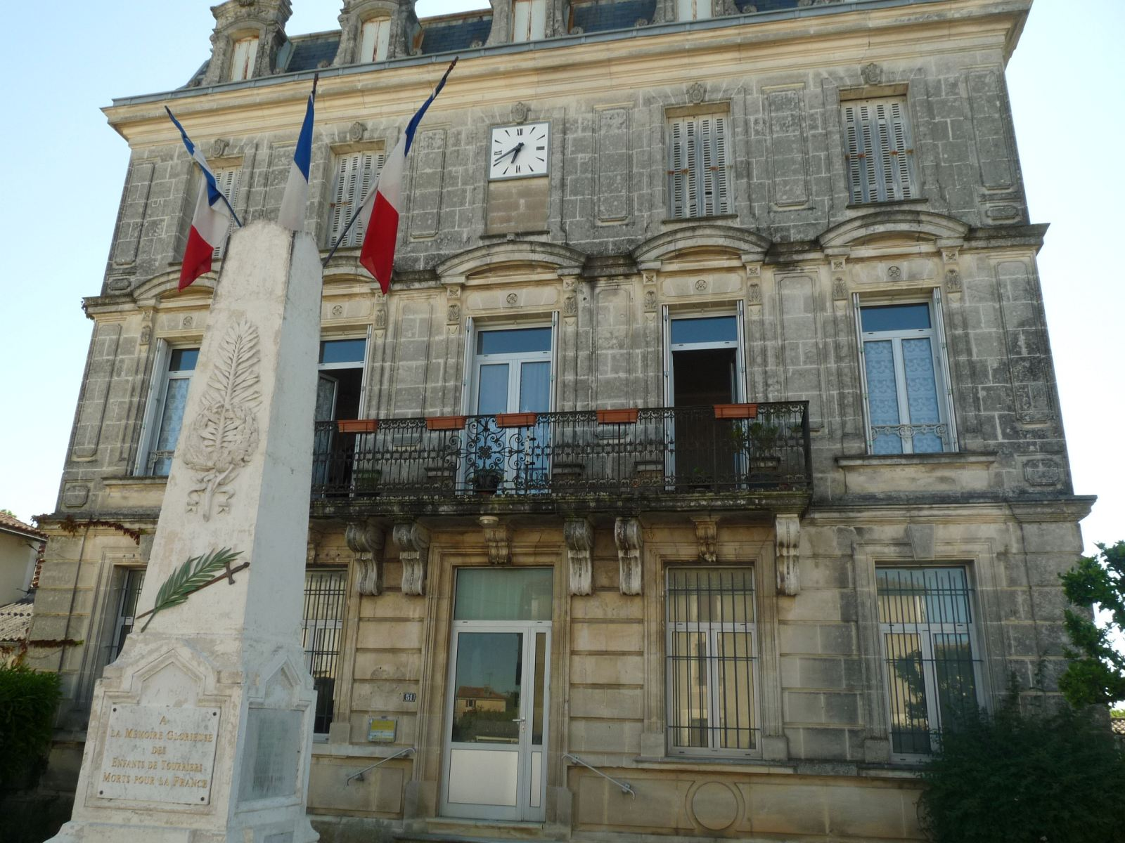 mairie de Tourriers, Charente, France